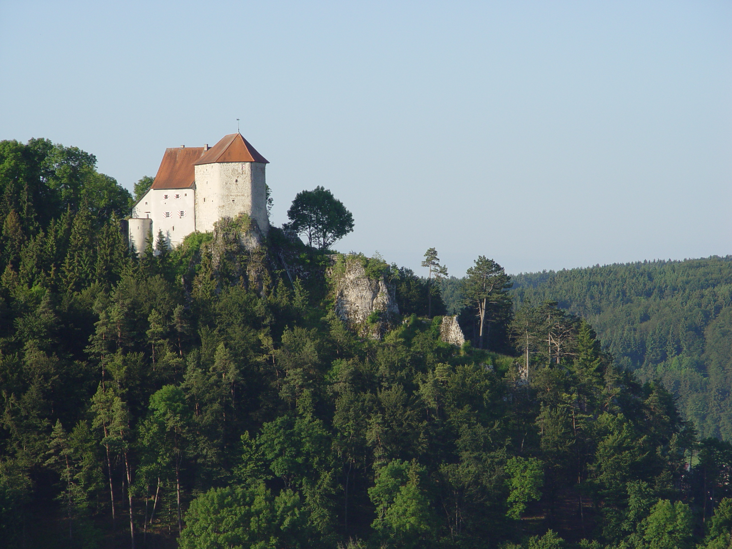 Burg Straßberg in Straßberg (Zollernalbkreis)